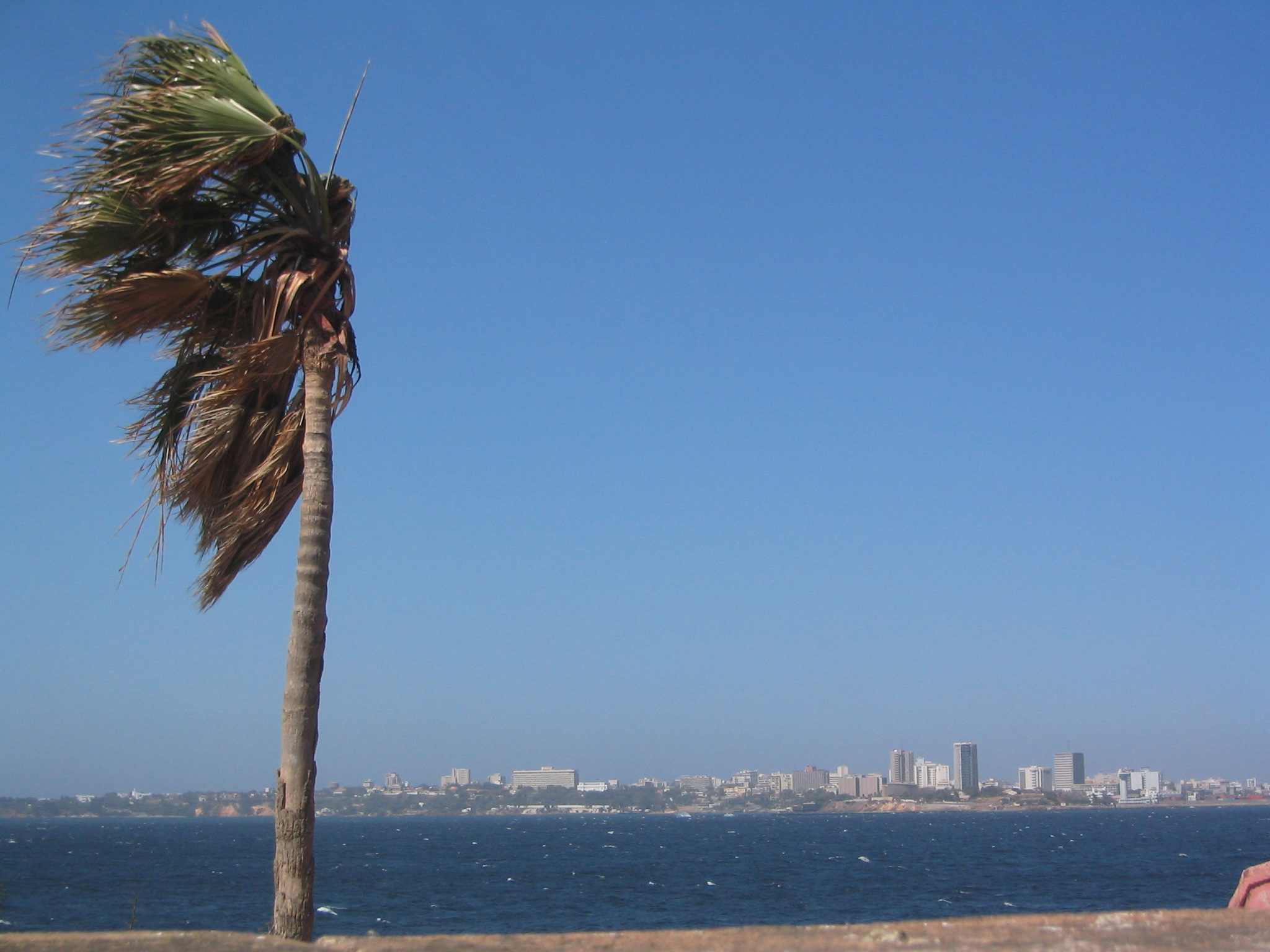 Dakar Plateau (vu depuis l'île de Gorée)